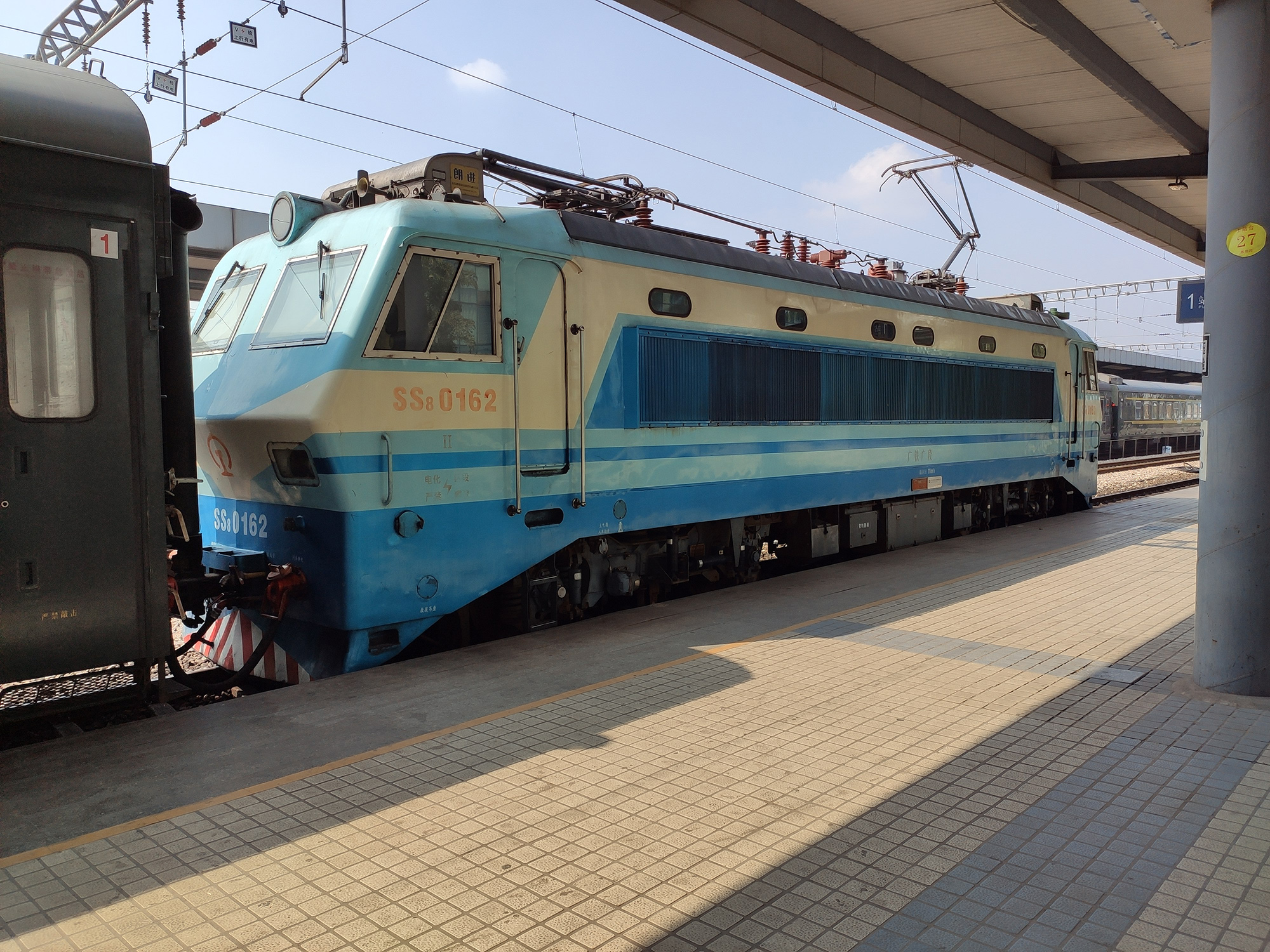 中文（中国大陆）: Z8005次车尾的韶山8型电力机车(摄于惠州站)